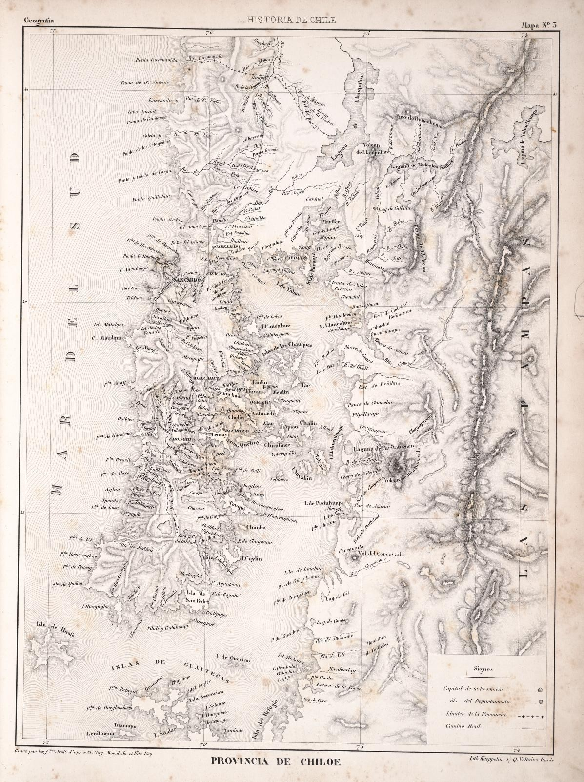 Mapa de la provincia de Chiloé, 1854.